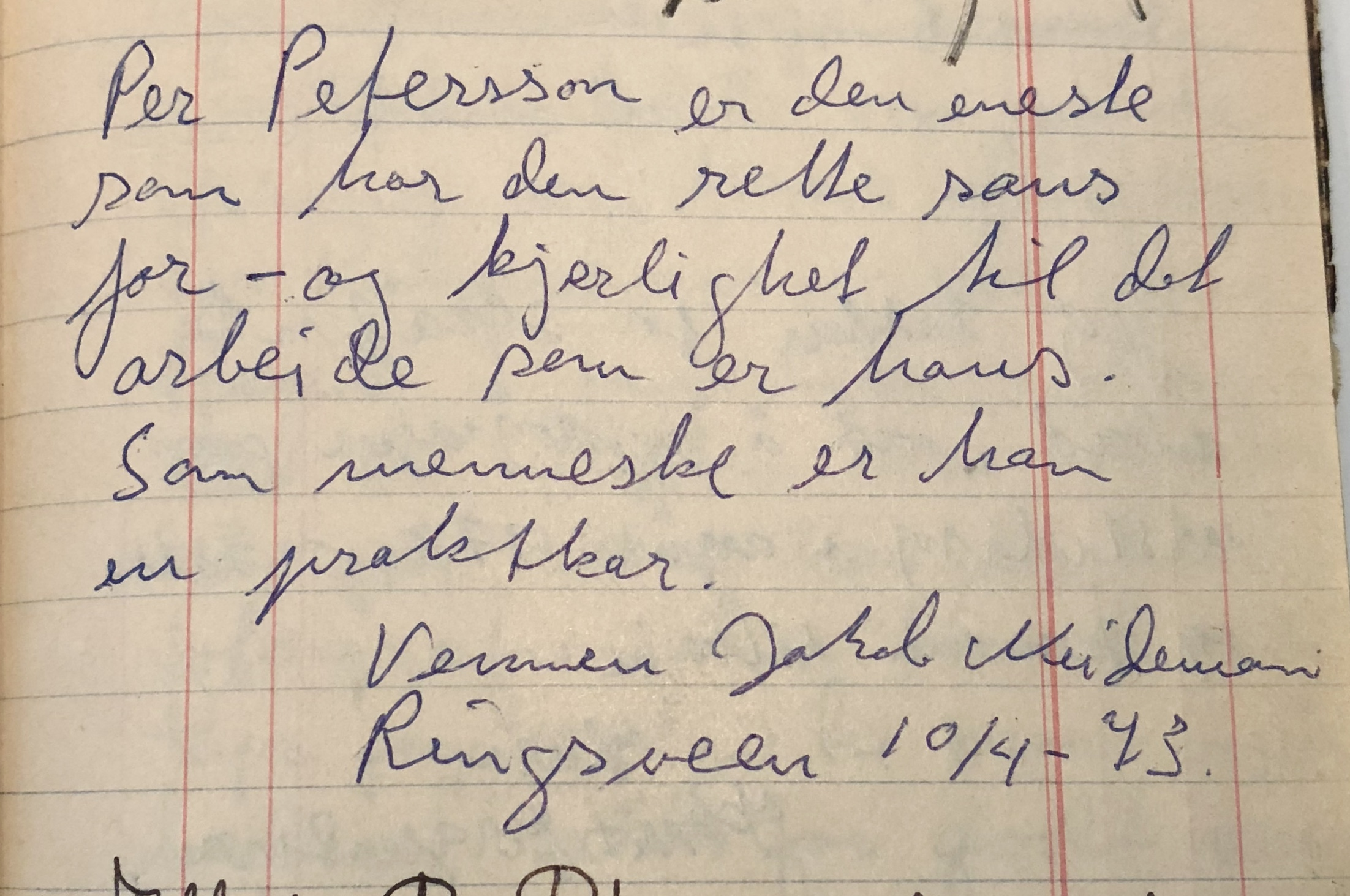 Personlig hilsen fra kunstneren Jakob Weidemann til fotograf Per Petersson, 10. april 1973